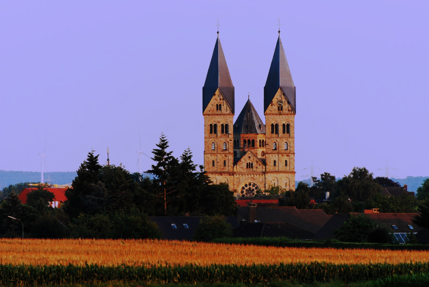 St. Anna, vom Dörper Berg aus gesehen, Kirche in Neuenkirchen, Kreis Steinfurt, Germany